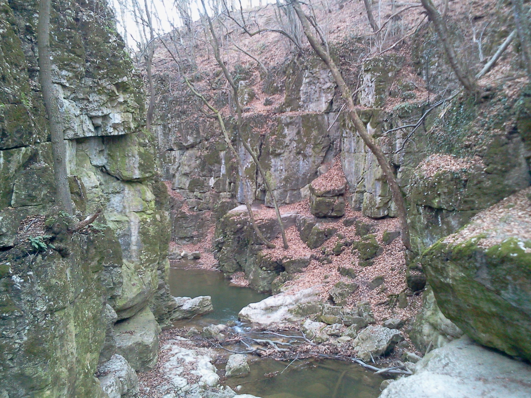 Bakonynána, Gaja-patak, Római fürdő (szurdok). A Gaja-patak közel 2 km hosszú, mély és meredek falú szurdokvölgye, vízeséssel. A leszakadó magas mészkőfalak között a Római-fürdőként ismert vízesésben ömlik alá a víz. Az országos kék túra útvonalán található. Forrás